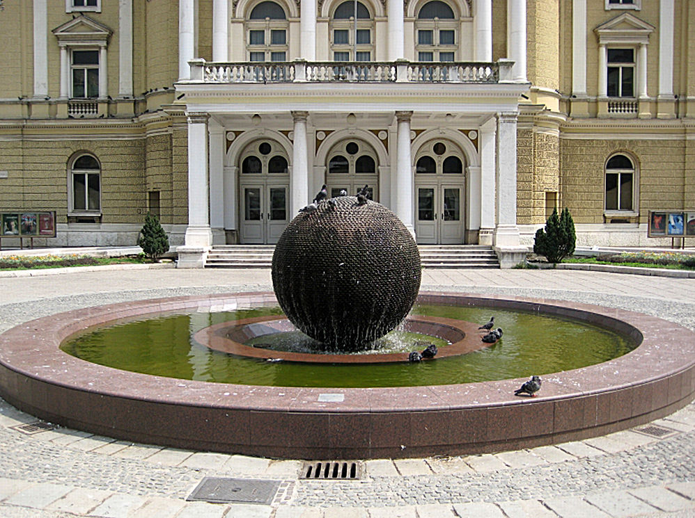 Skulptura Dušana Džamonje u Rijeci, Croatia